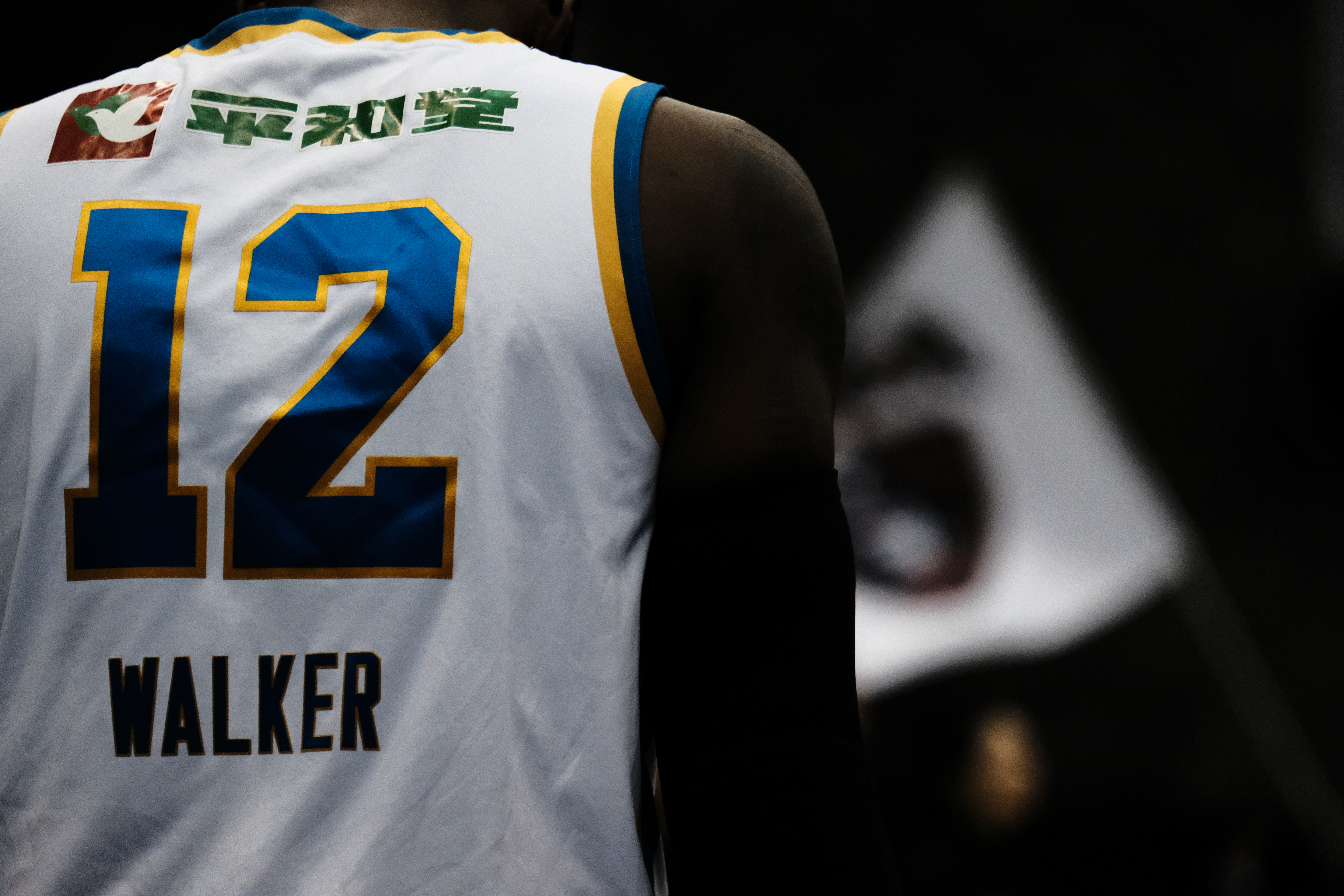 横浜ビーコルセアーズvs滋賀レイクスターズ